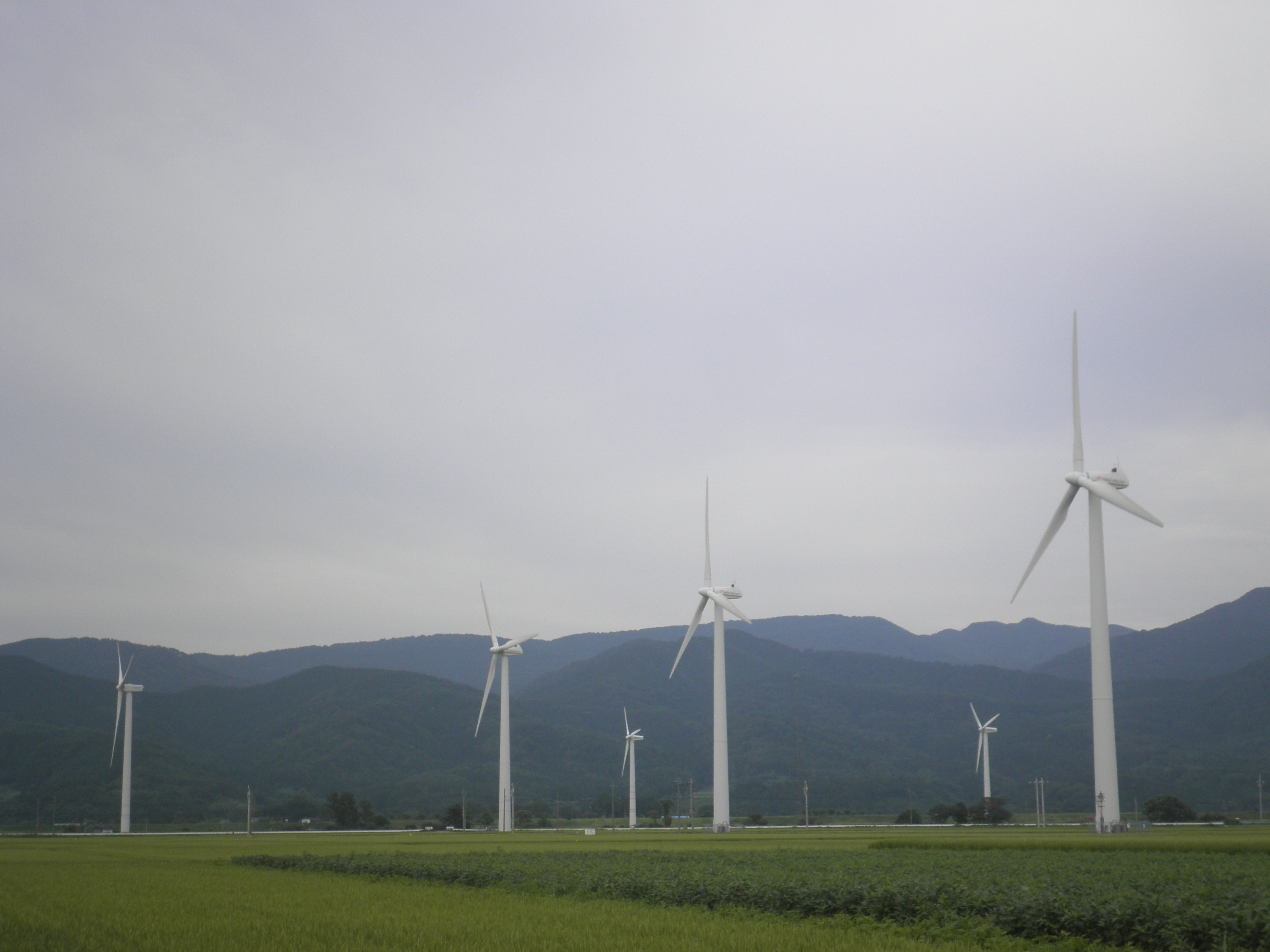 山形県東田川郡庄内町のウィンドファーム立川